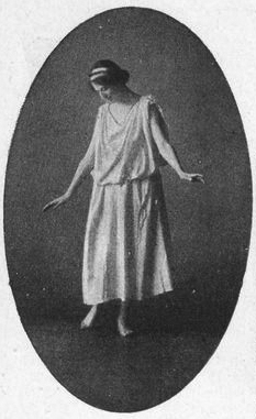 Anna Behle (1876-1966)